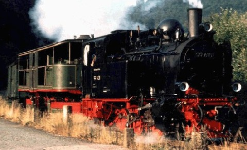 99 6101 vor 99 162 bei der Durchfahrt in Netzkater bei Ilfeld auf der Harzquerbahn.